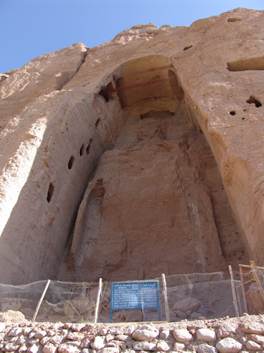 Bouddhas de Bâmiyân août 2005